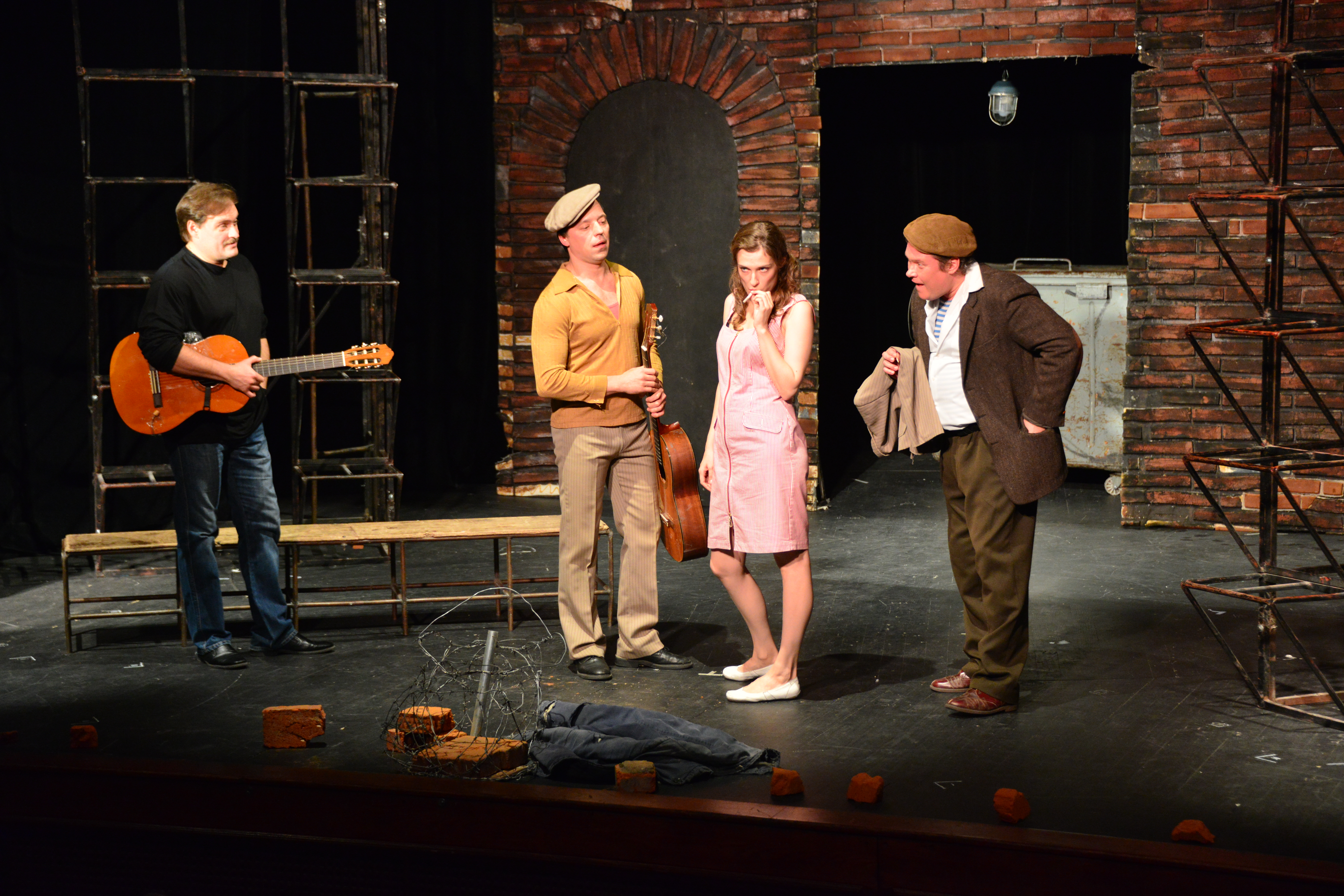 Спектакль «Роман о девочках» на сцене театра «У Никитских ворот» 08.10.2017